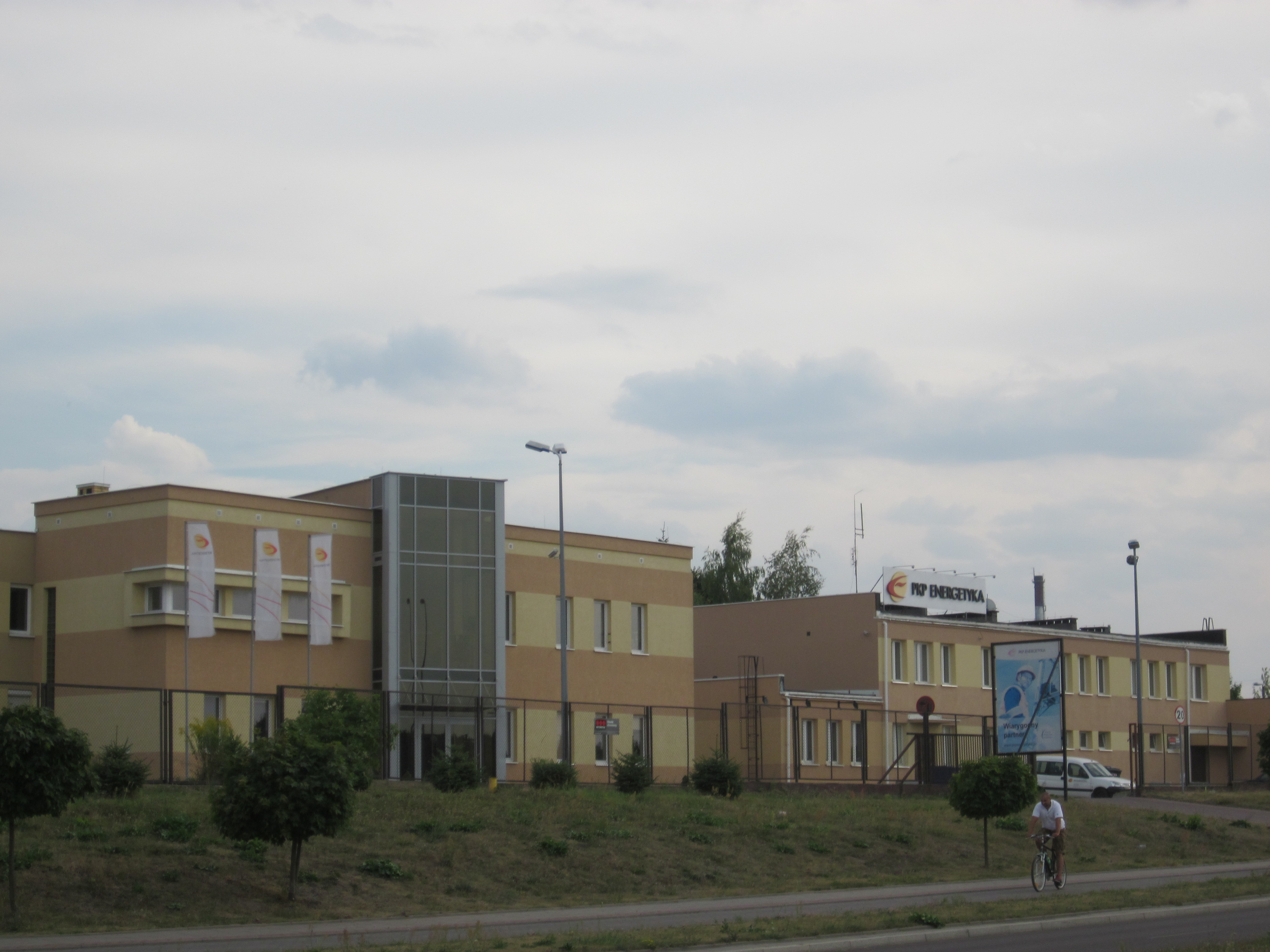 PKP Energetyka S.A. Zakład Wschodni, Białystok ul. Hetmańska 103.